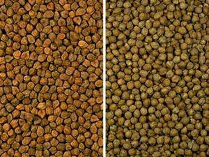 Csicsriborsó